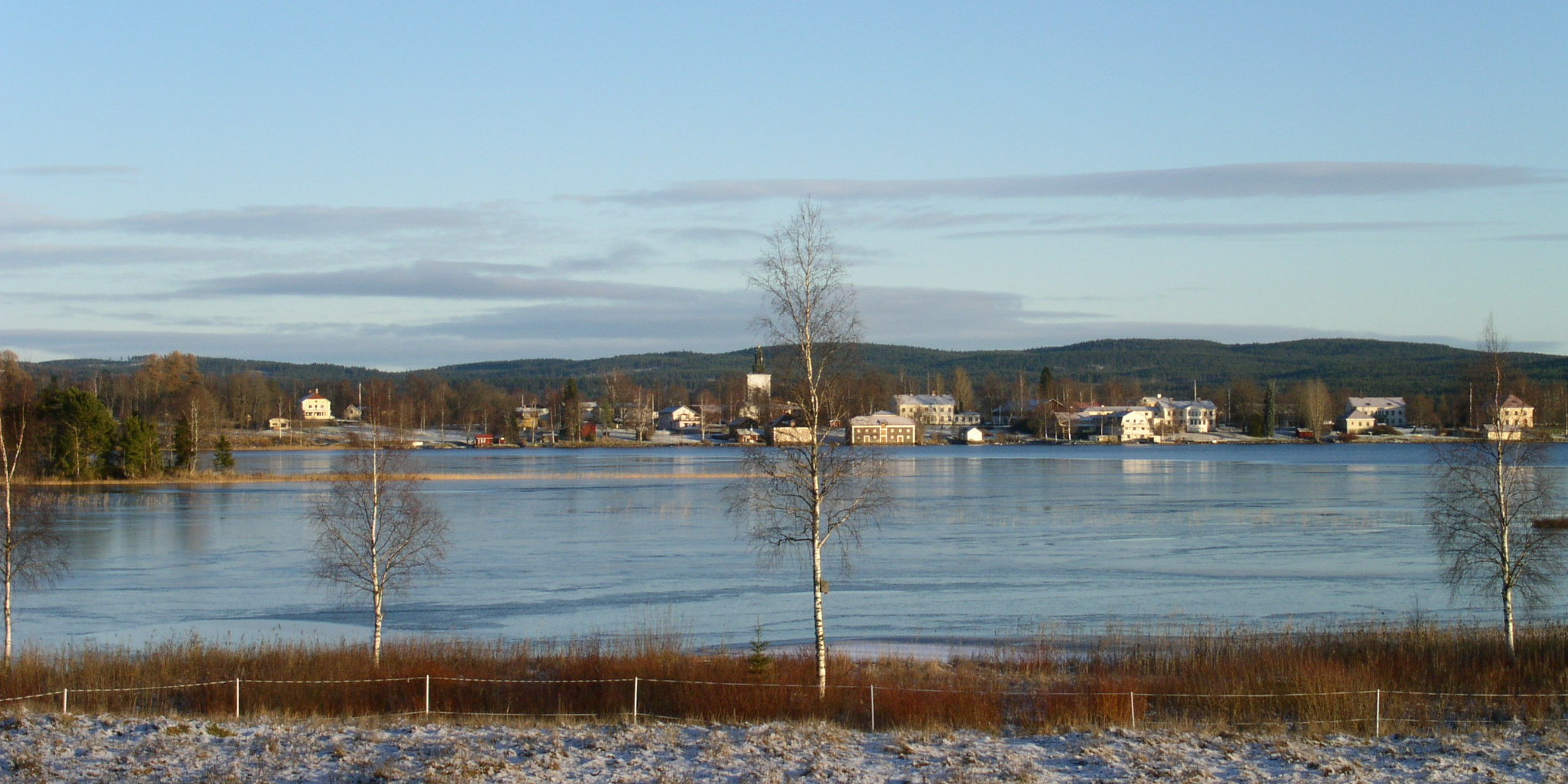 Bysjön och en del av Grangärde kyrkby sedd från Västansjö, Dalarna. Bilden tagen mot väster.